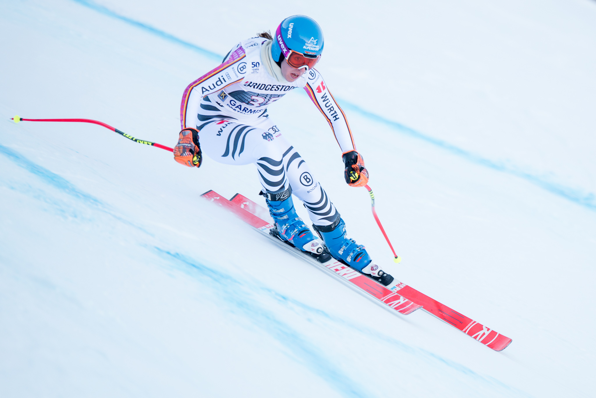 64. Kandahar Rennen,Audi FIS Ski Weltcup Garmisch-Partenkirchen,Damen Abfahrt,Kandahar,Kira Weidle,Ladies Downhill